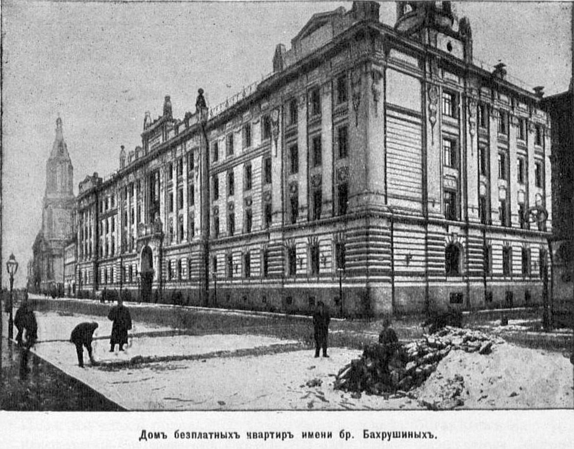 Дом бесплатных квартир имени братьев Бахрушиных